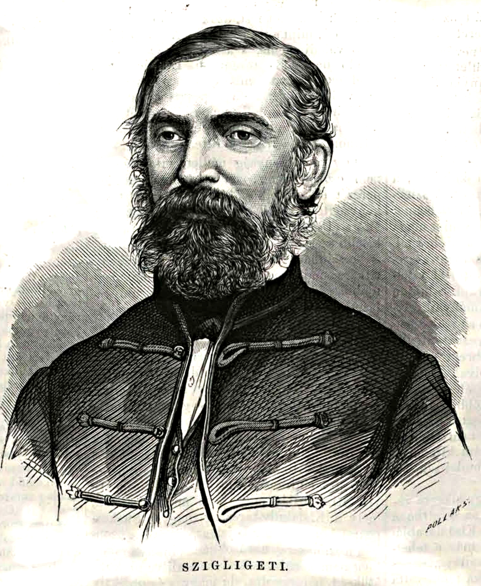 Szigligeti Ede – Szathmáry József (1814–1878) színműíró. Pollák Zsigmond metszete (Vasárnapi Ujság, 1869. augusztus 29.)